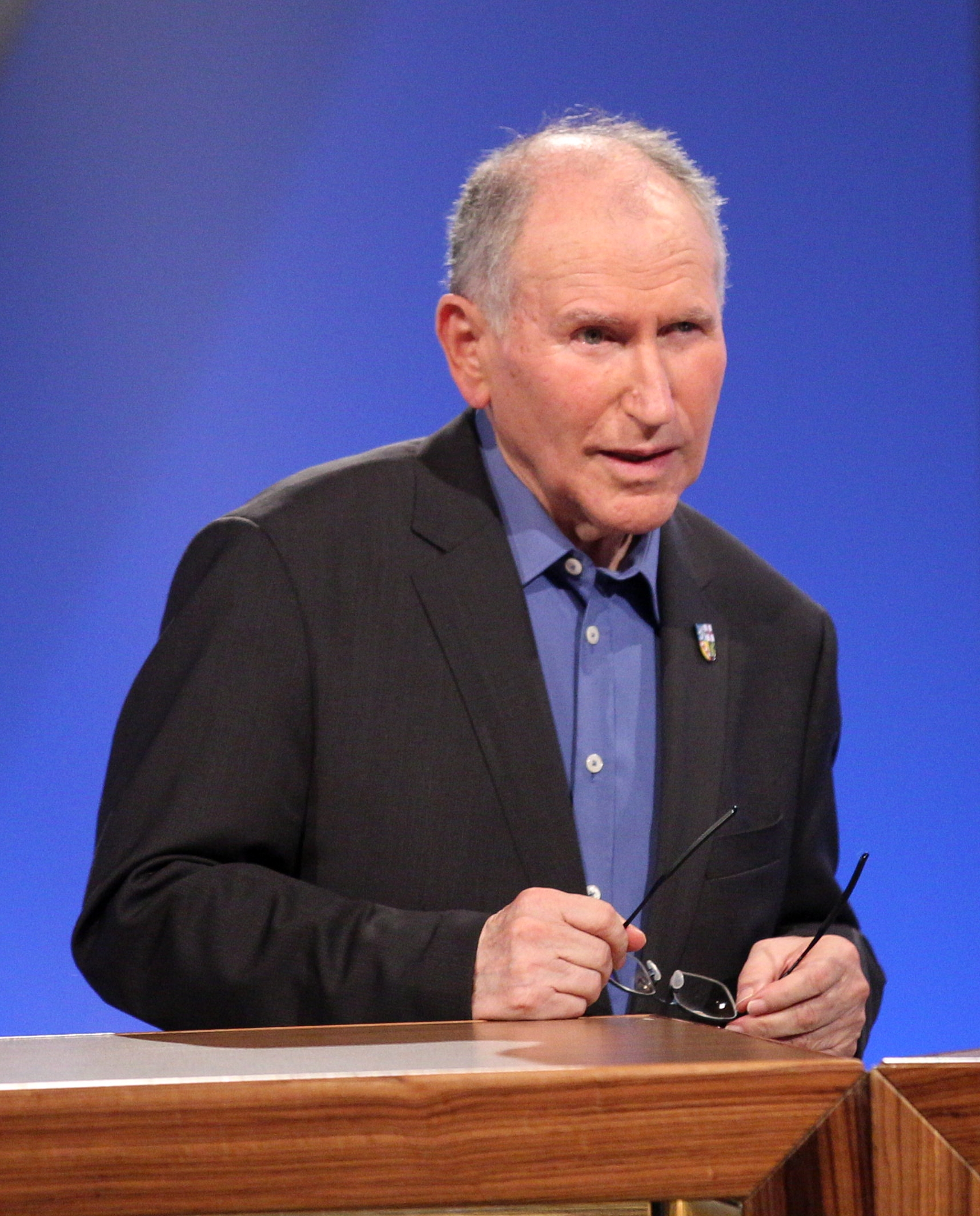 Josef Dörr (AfD)